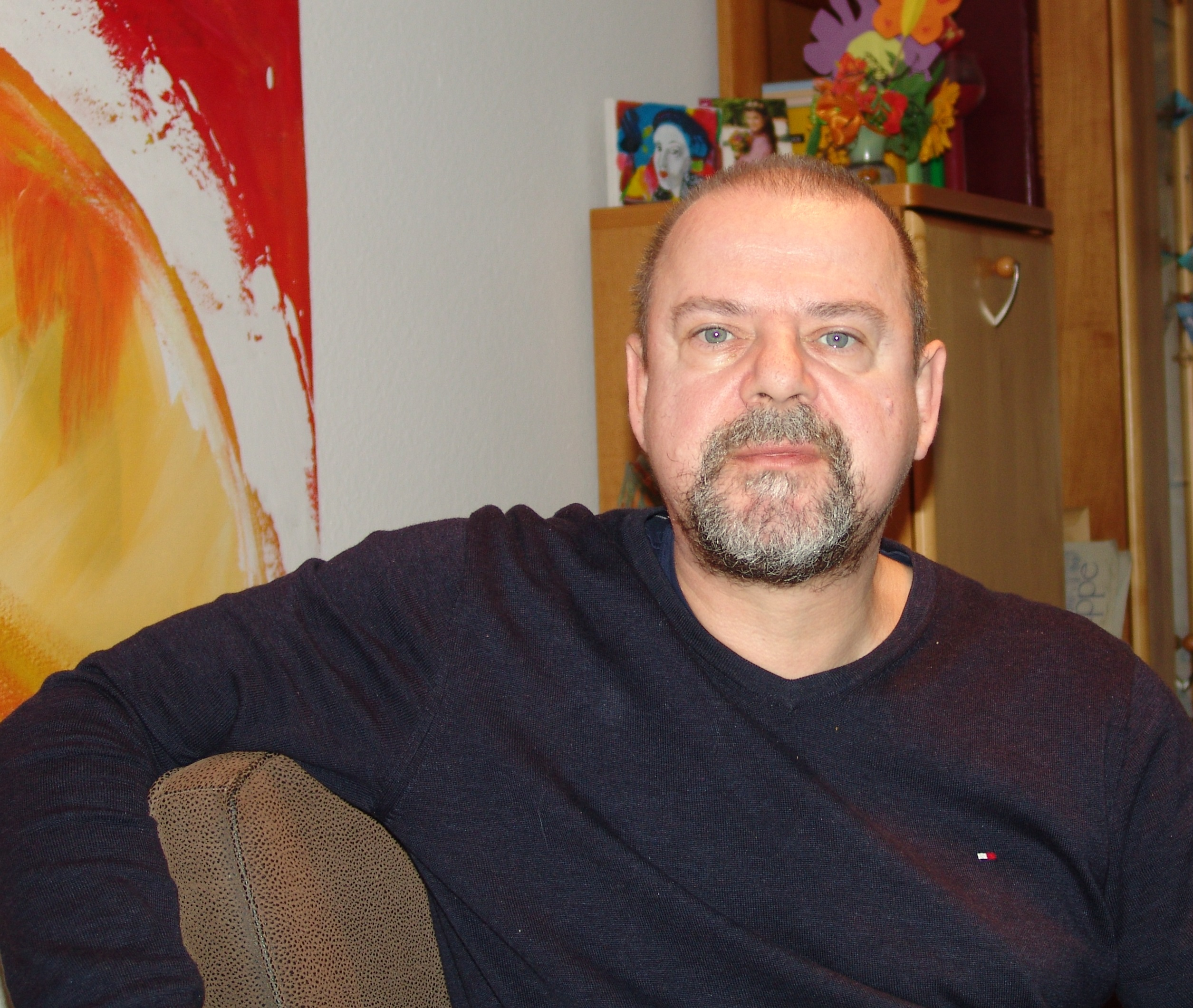 Armin Andreas Pangerl